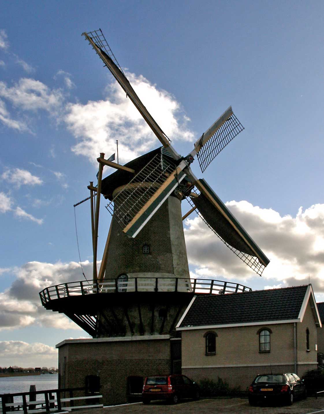 Nieuwerkerk aan den IJssel: molen Windlust, gezien vanaf de dijk